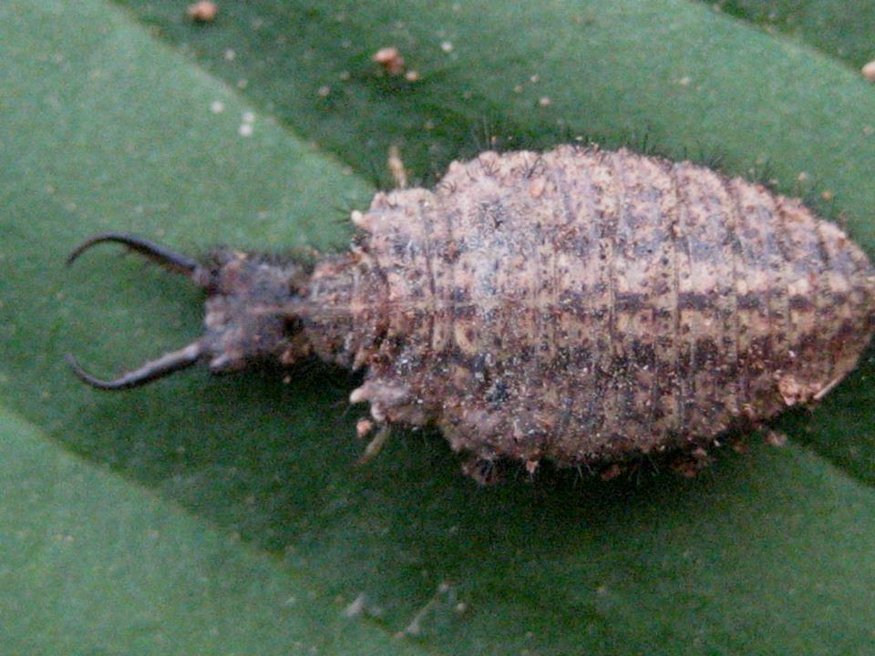 Qarışqa aslanının sürfəsi (Foto İ.Q.Kərimova)